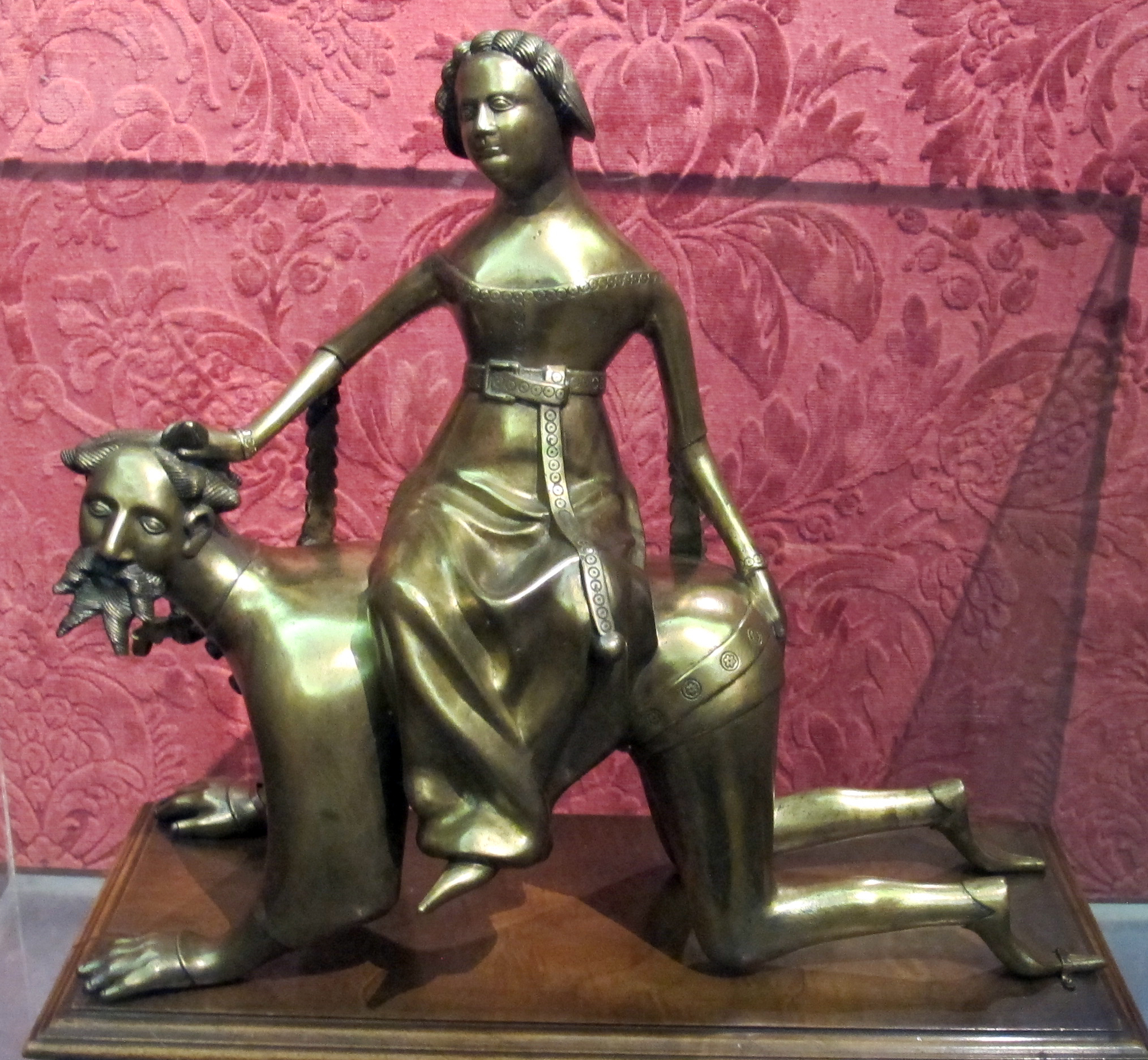 Objects d'art nel Metropolitan Museum of Art